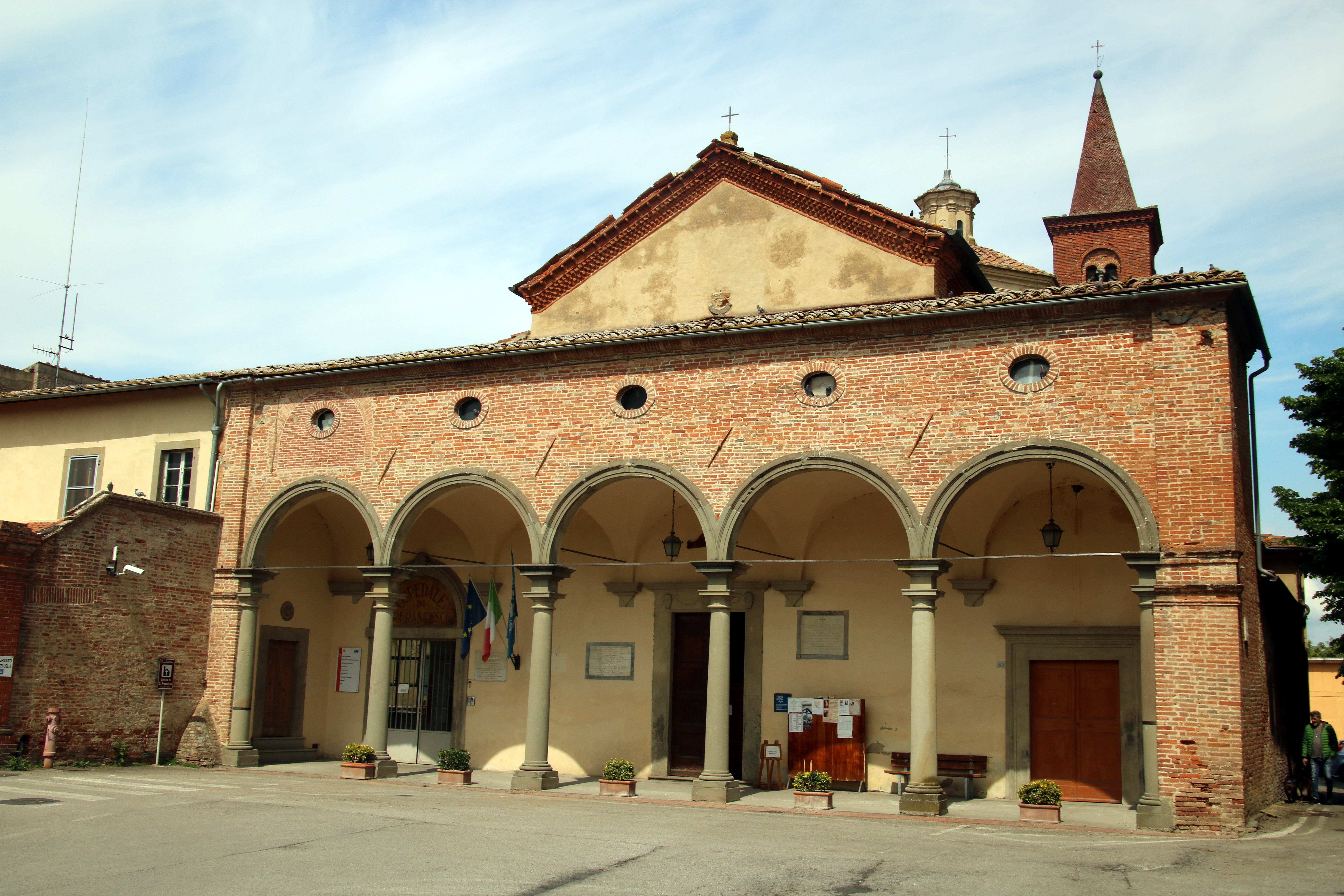 Chiesa di San Francesco in Chianacce (Foiano della Chiana), esterno